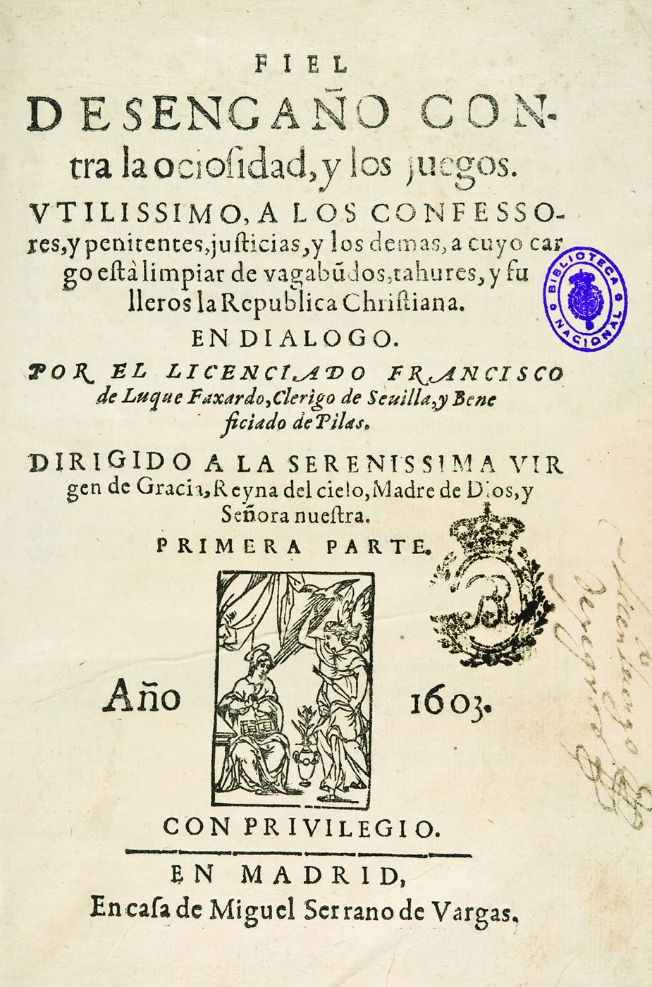 Frontis de Fiel desengaño contra la ociosidad y los juegos... de Francisco Luque Fajardo, Madrid, en casa de Miguel Serrano de Vargas, 1603, Biblioteca Nacional de España, R/6124. Ejemplar digitalizado en Biblioteca Digital Hispánica [1]